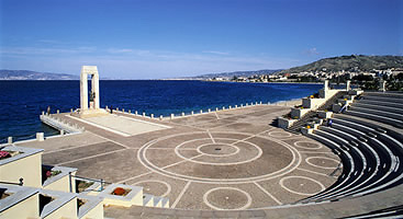 Reggio Calabria - Camillo Autore, Arena dello Stretto e Cippo marmoreo